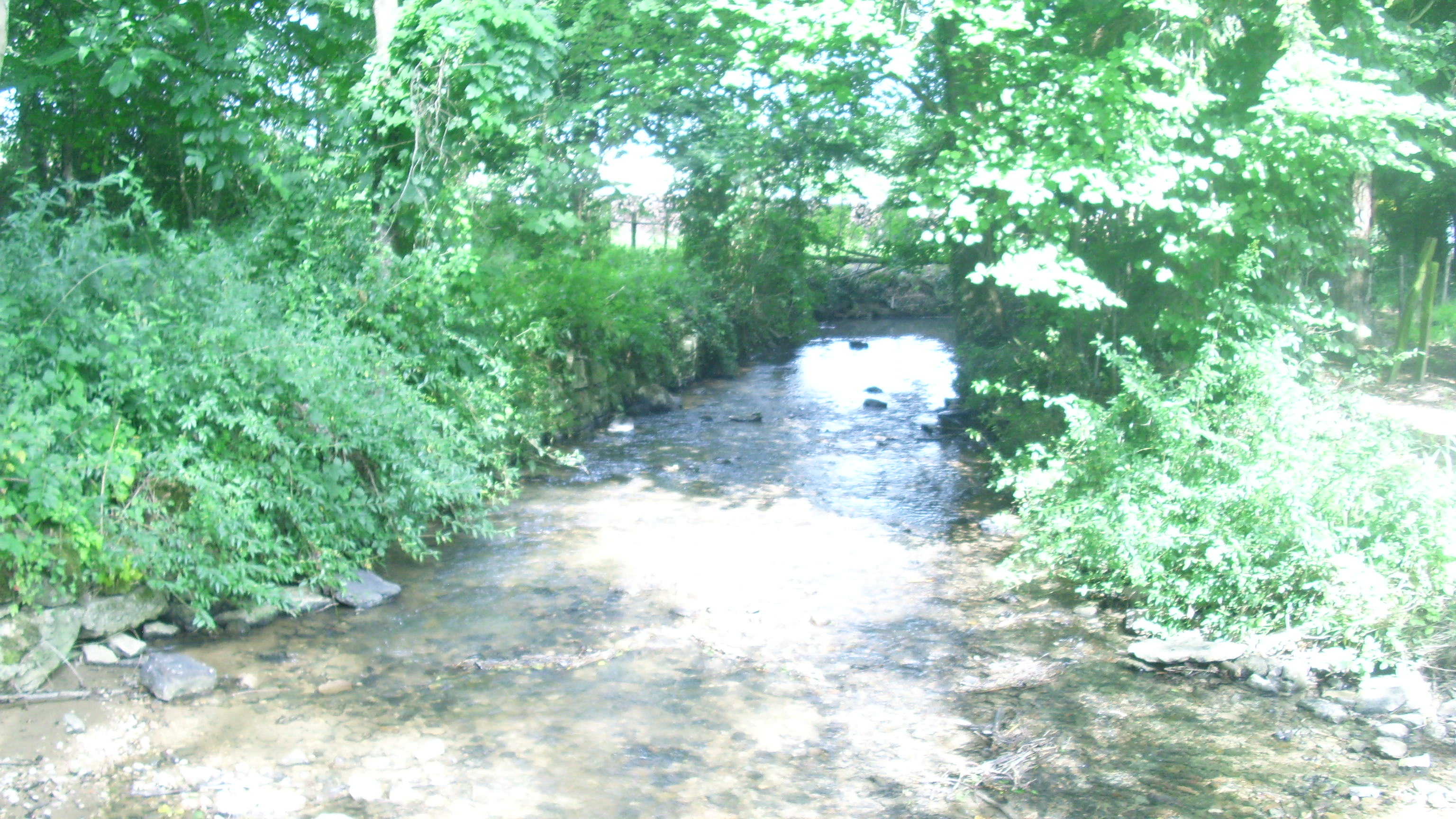 Vue de l'Orbize à Mellecey (71)